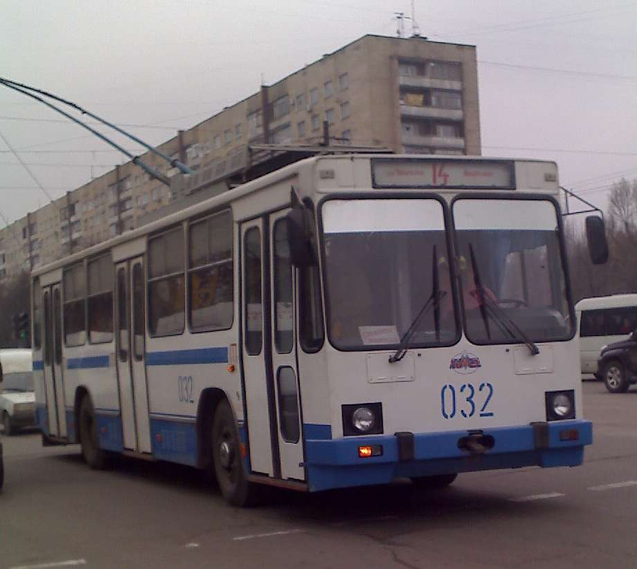 YUMZ-T2 Trolleybus in Zaporizhia, Ukraine